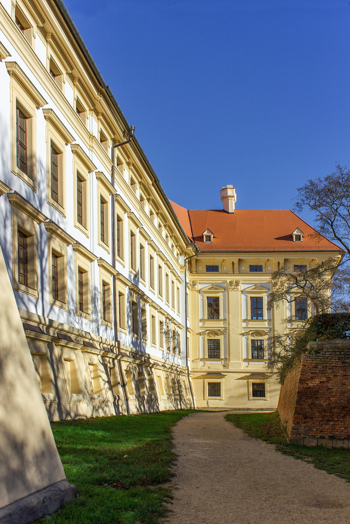 Zámecký příkop